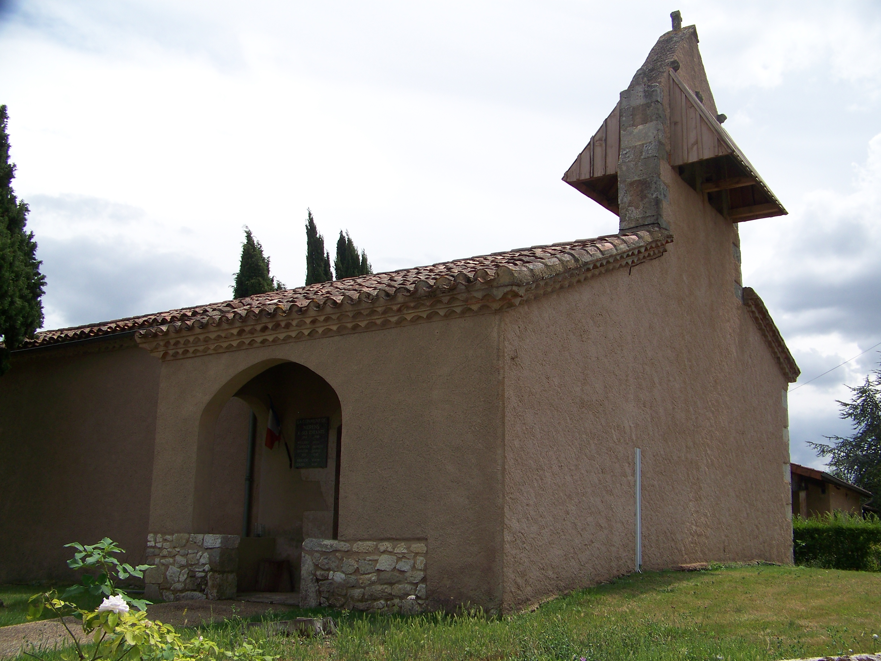 Église du village de Mérens (Gers, France).